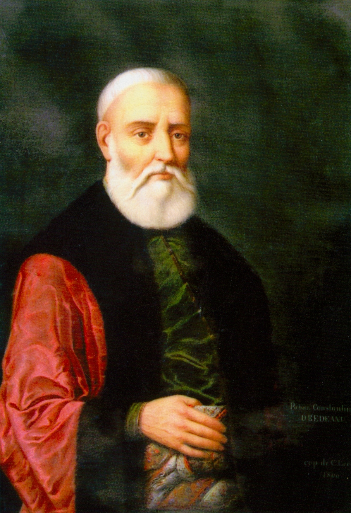 Portretul paharnicului Constantin Obedeanu, Muzeul de Artă din Cluj